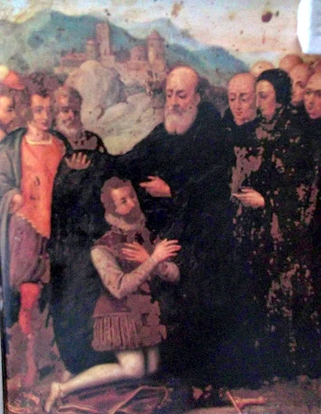 Foto-riproduzione di un dipinto di Autore anonimo Ruggero Sanseverino si prosta ai piedi di San Pietro Pappacarbone secolo XVI. Abbazia SS. Trinità di Cava de' Tirreni (Italia)